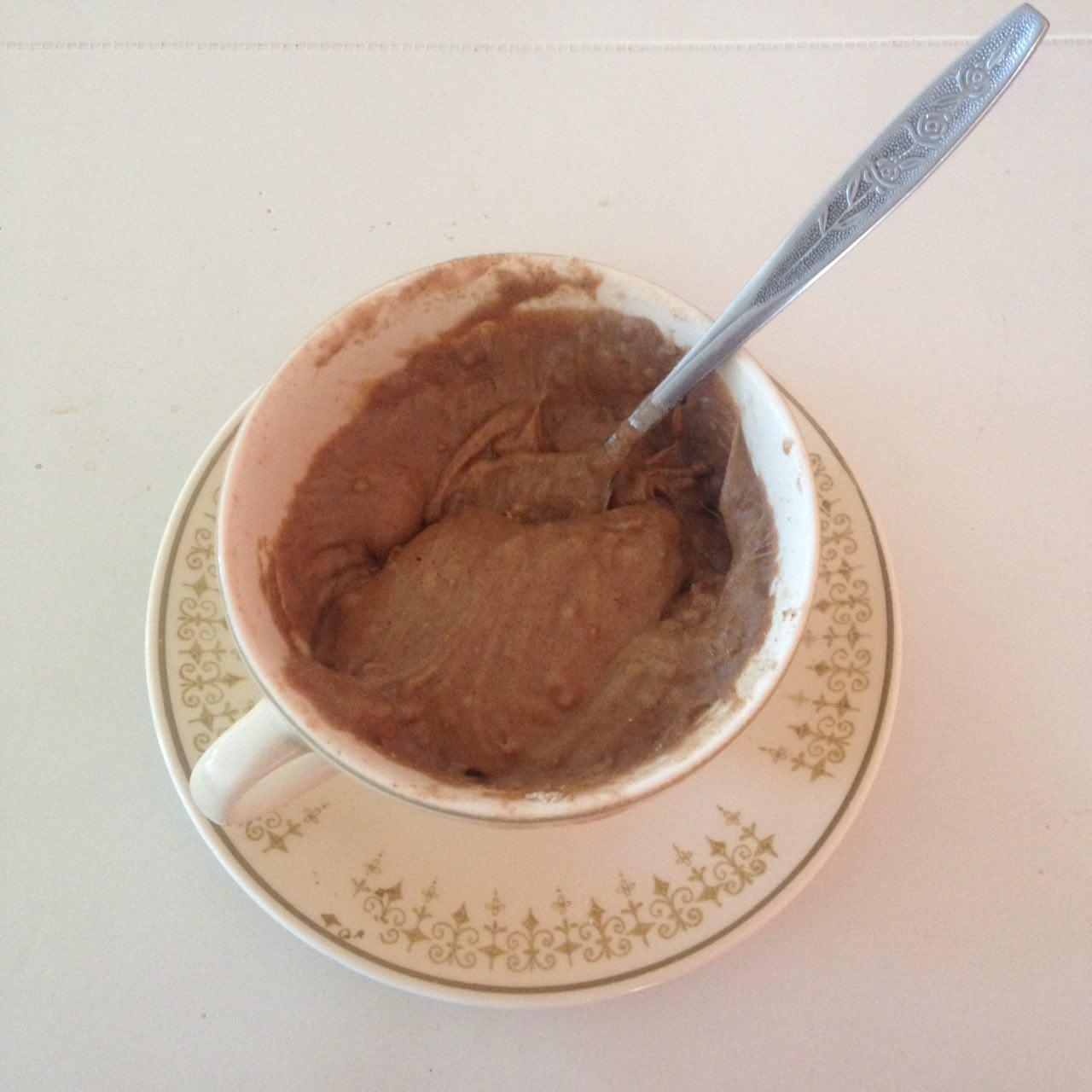 Taza de chapo preparado con chocolate, máchica y queso mozarella.